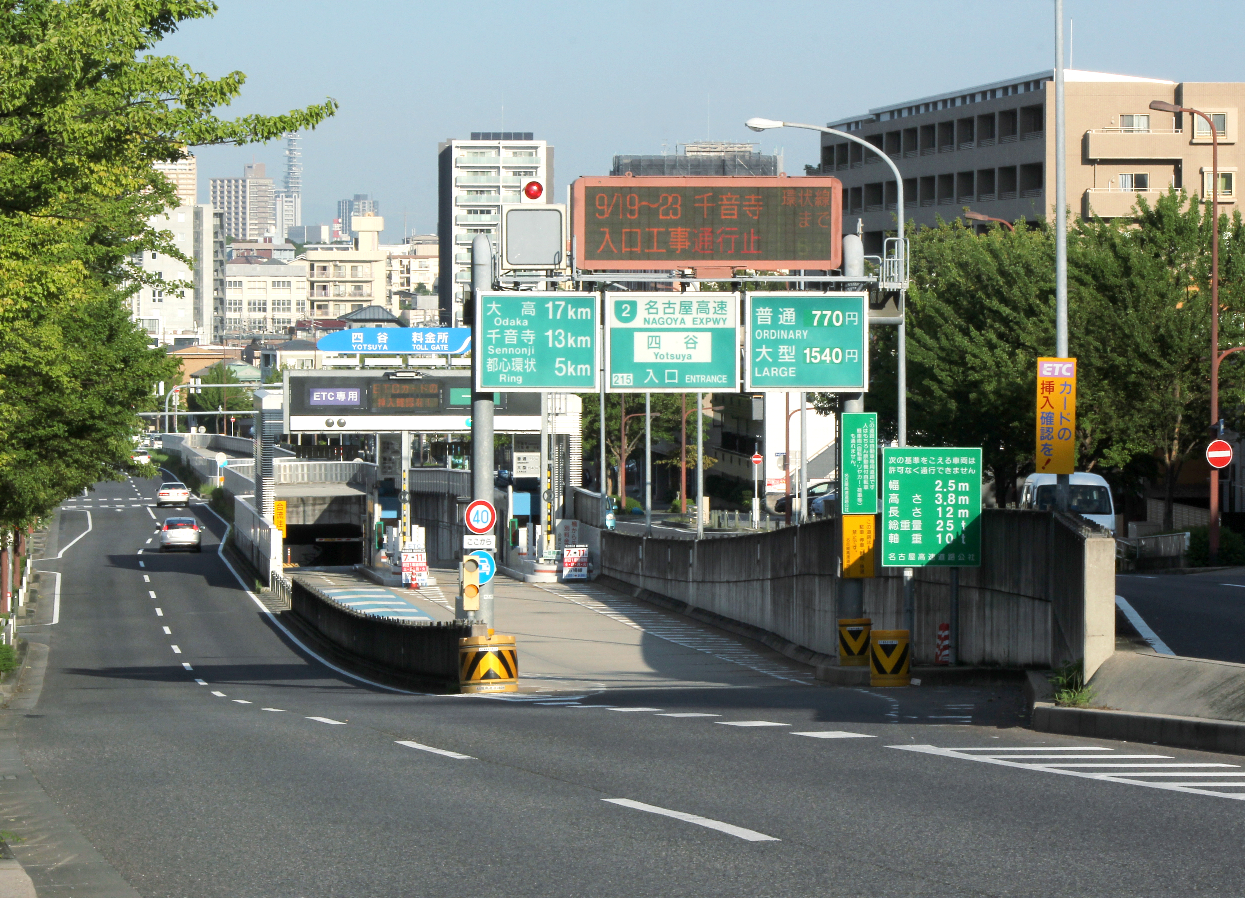 名古屋高速 四谷入口